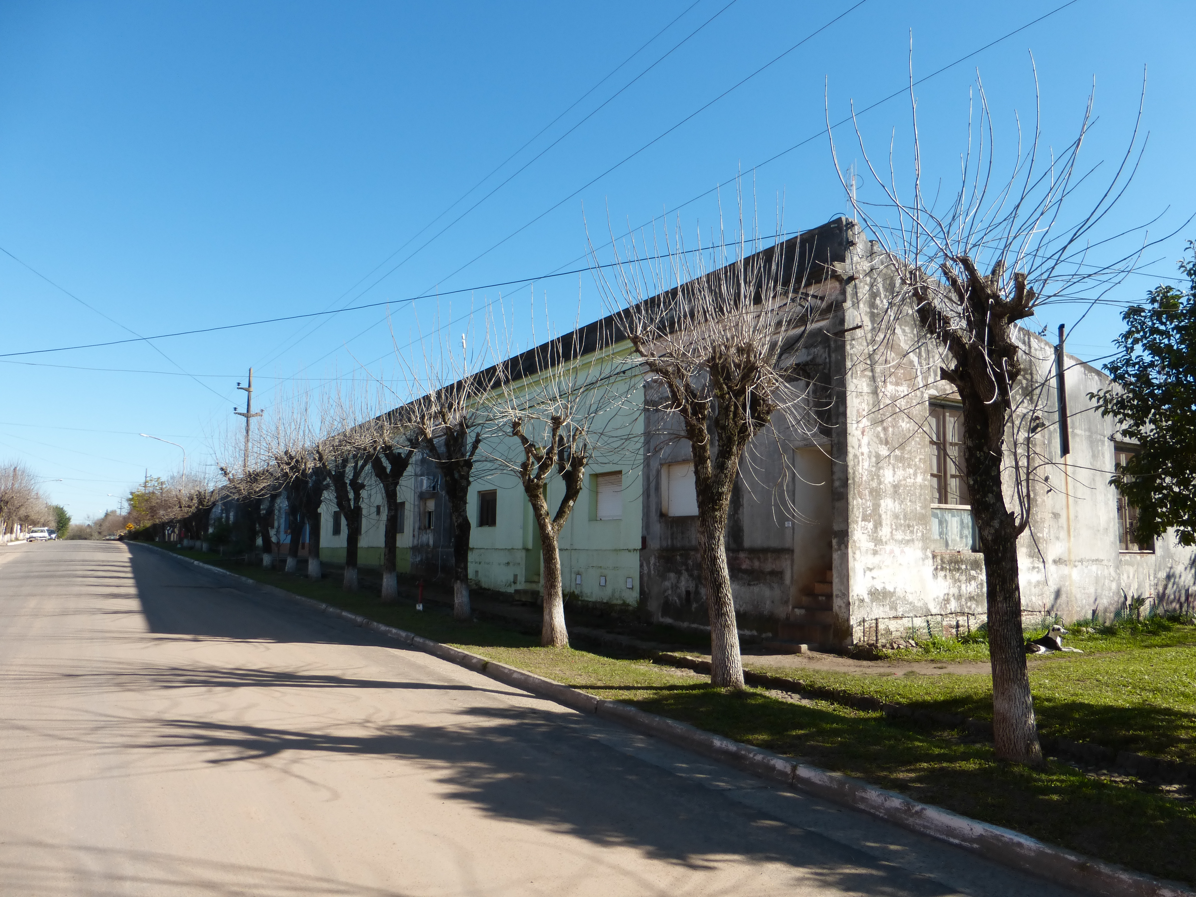 Vista de la calle 17 de mayo en Pueblo Liebig, Departamento de Colón, Entre Ríos, Argentina.